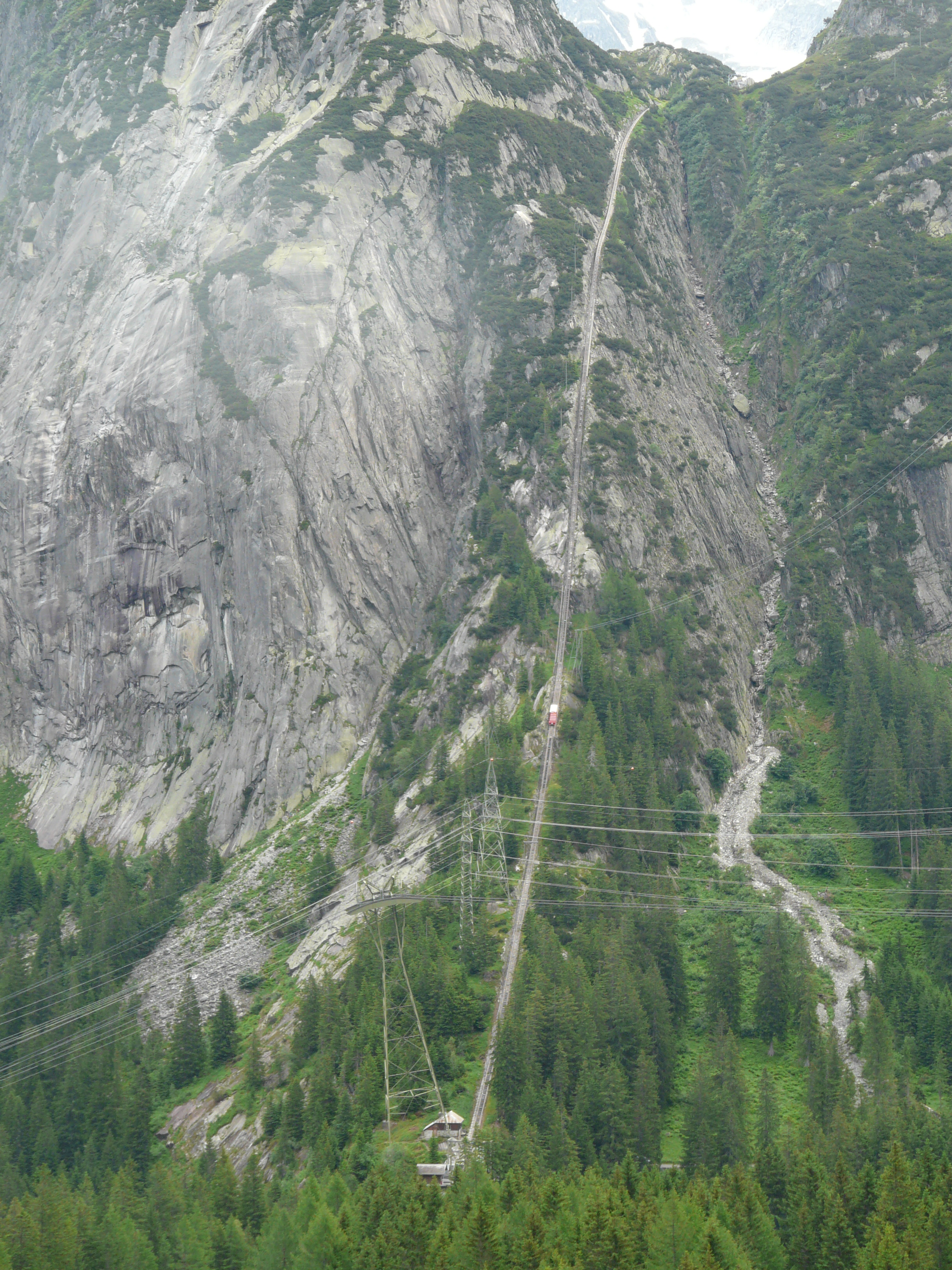 Trasse der Gelmerbahn